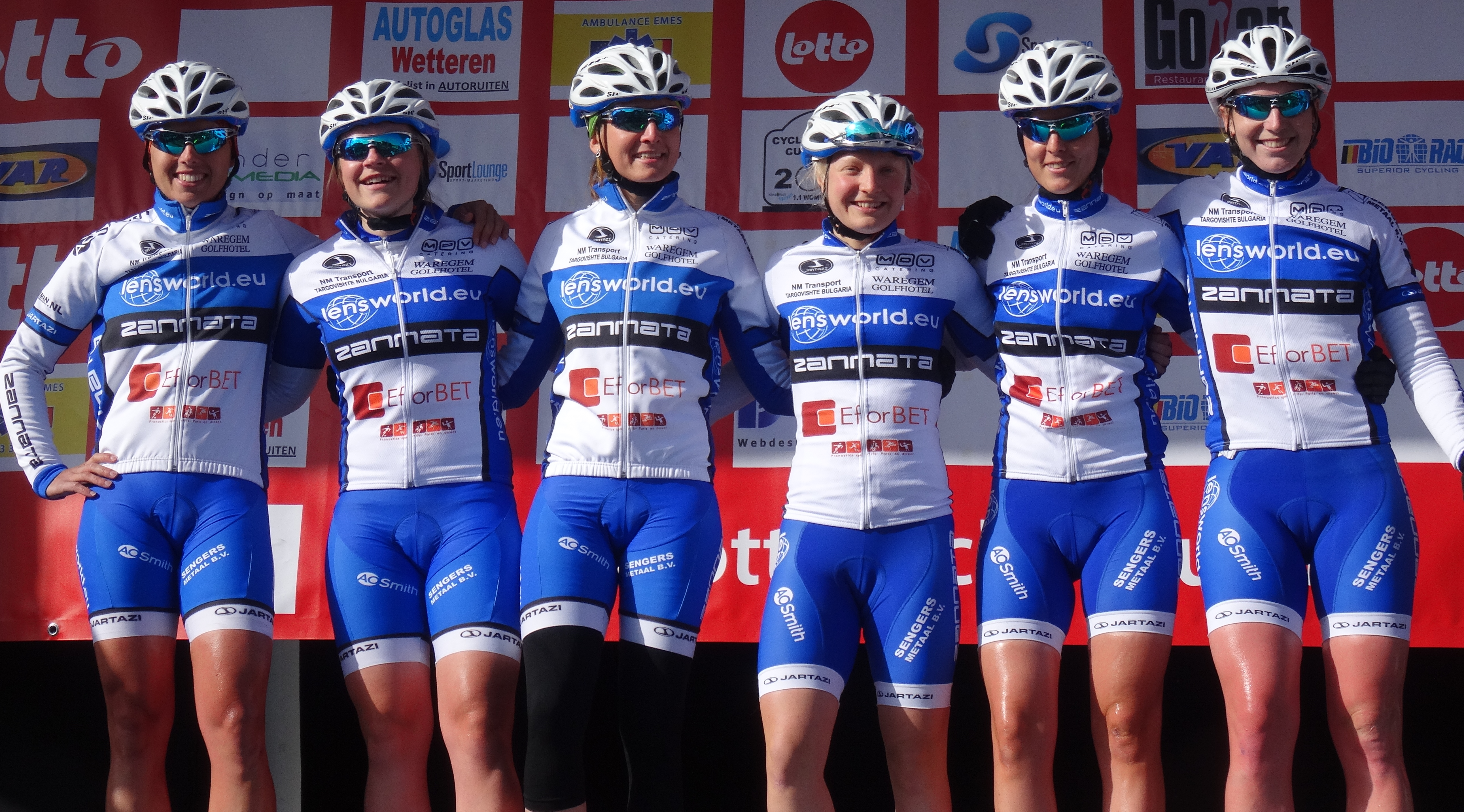 Reportage réalisé le mercredi 4 mars à l'occasion du départ du Samyn des Dames 2015 et du Samyn 2015 à Quaregnon, Belgique.